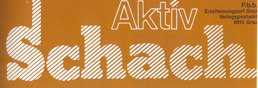 Kopf der Schachzeitschrift "Schach Aktiv" (1983), das offizielle Organ des Österreichischen Schachbundes (ÖSB).